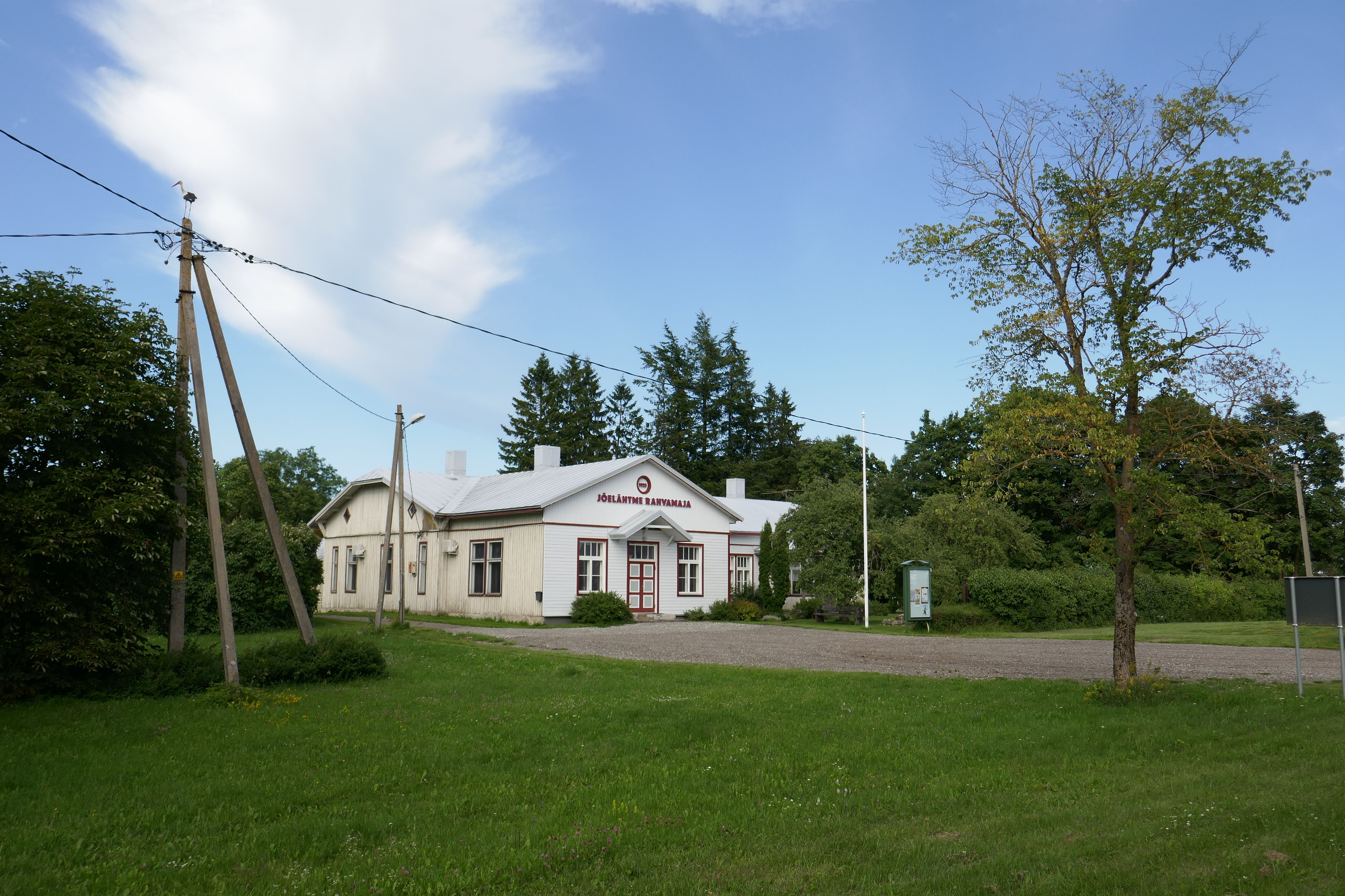 Jõelähtme rahvamaja juulis 2018 (Jõelähtme silla poolt vaadatuna).